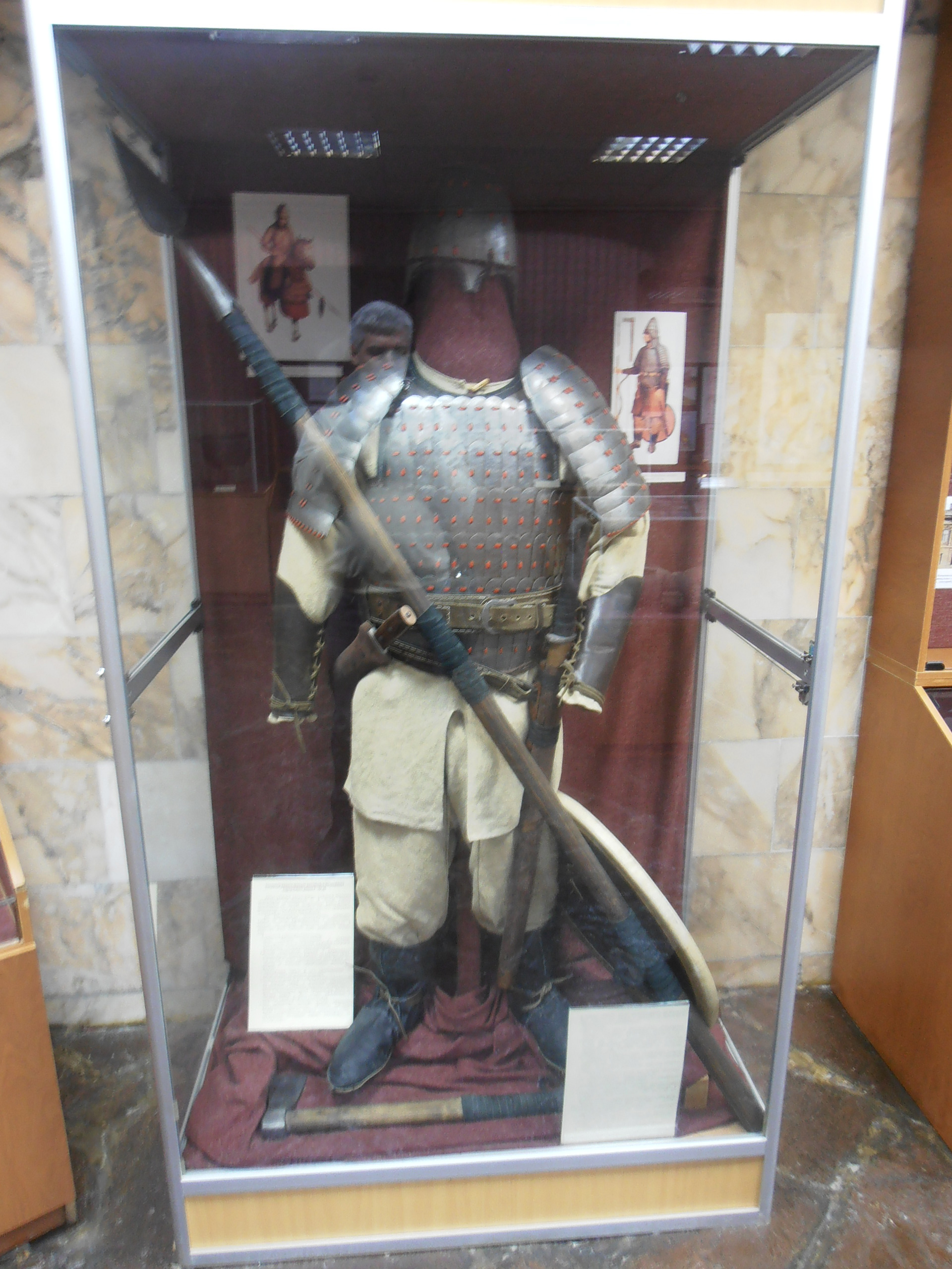 Реконструкция вооружения и доспехов саргатского воина. Экспонат зала археологии Музея археологии и этнографии Тюменского государственного университета.